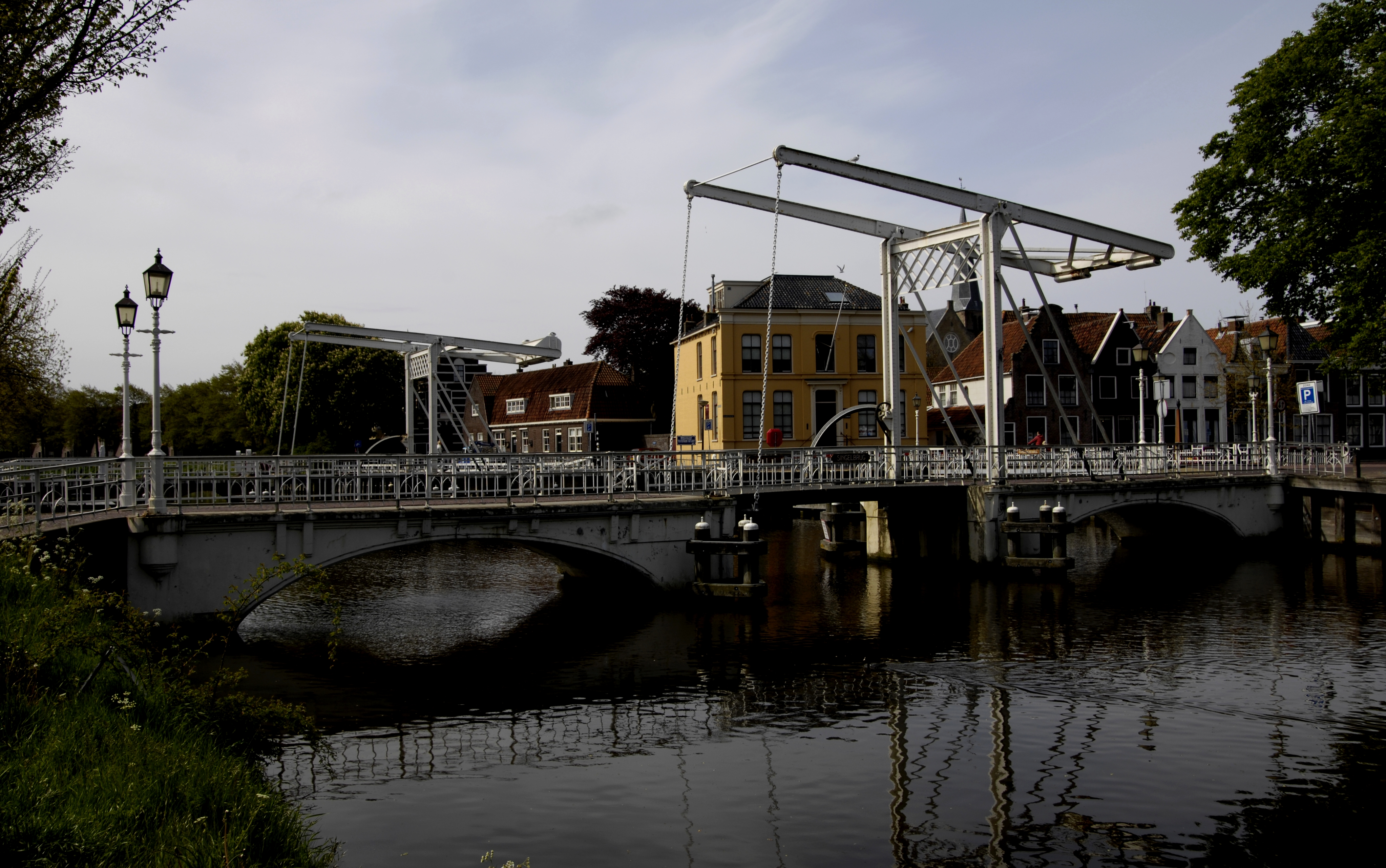 Harlingen, Friesland, typisch für das Stadtbild:Hebebrücken